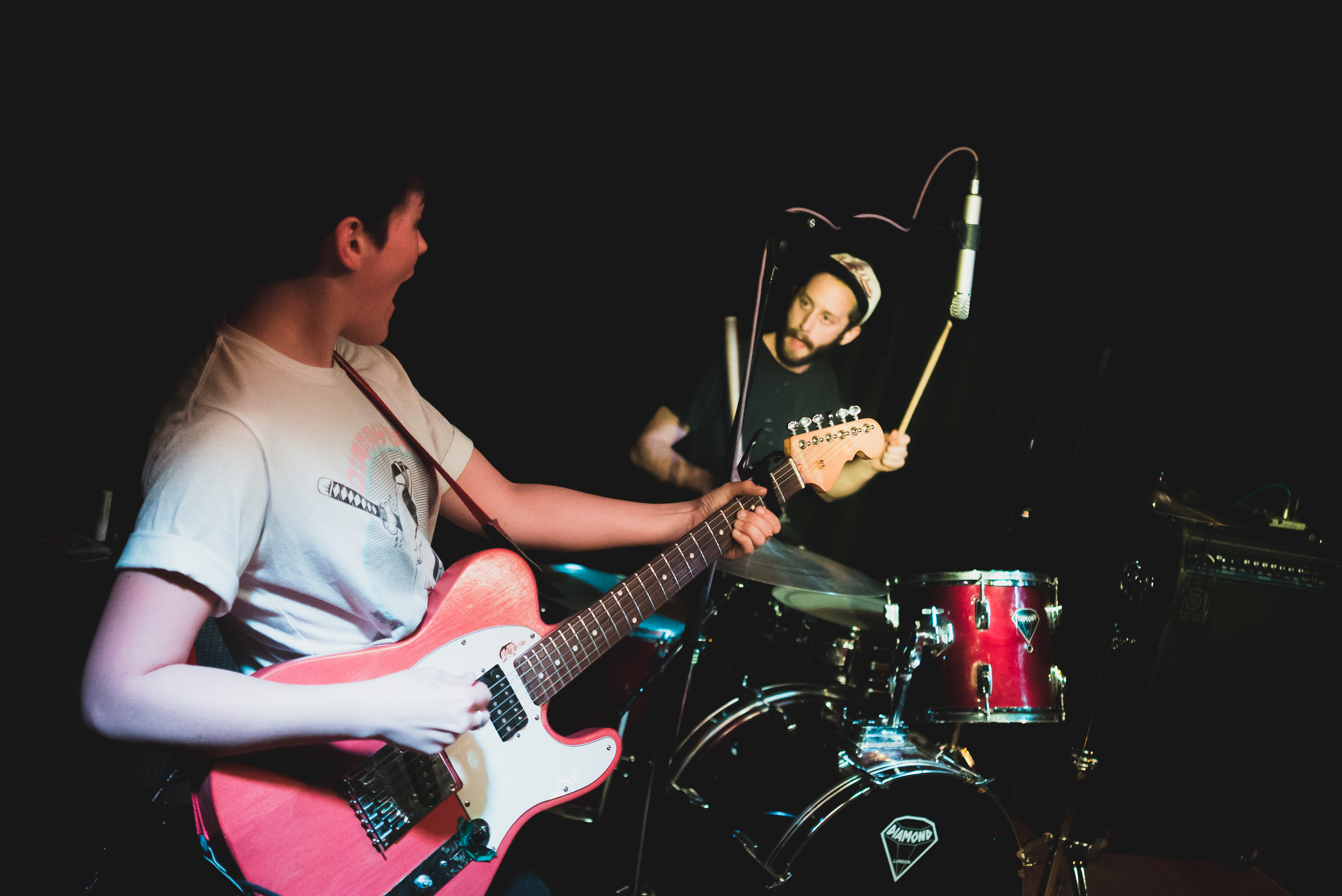 Diet Cig at Servant Jazz Quarters